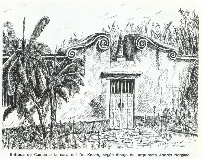 Esquema de la entrada de la Hacienda Buena Vista.